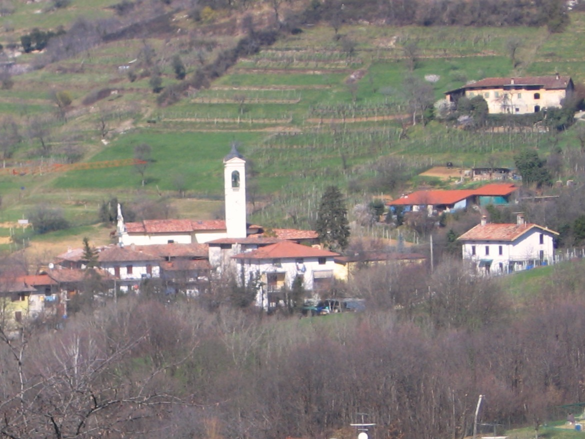 fraz. Gavarno S.Antonio, Nembro, Bergamo, Italy